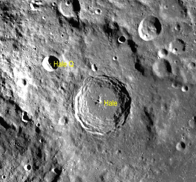 Cráter lunar Hale. Cráteres satélite. (Imagen LRO)